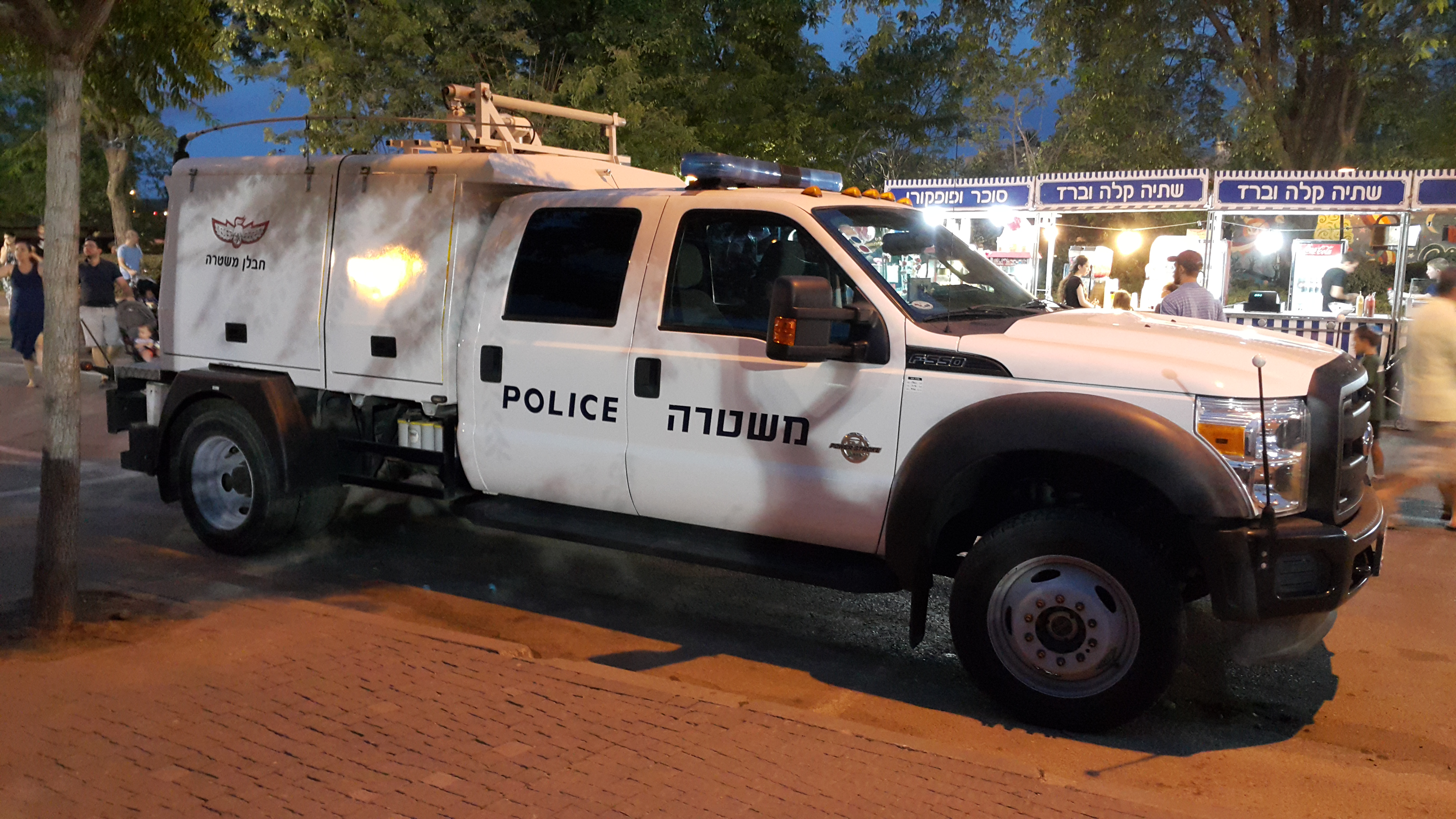 רכב כולא פיצוץ של מערך החבלה המשטרתי